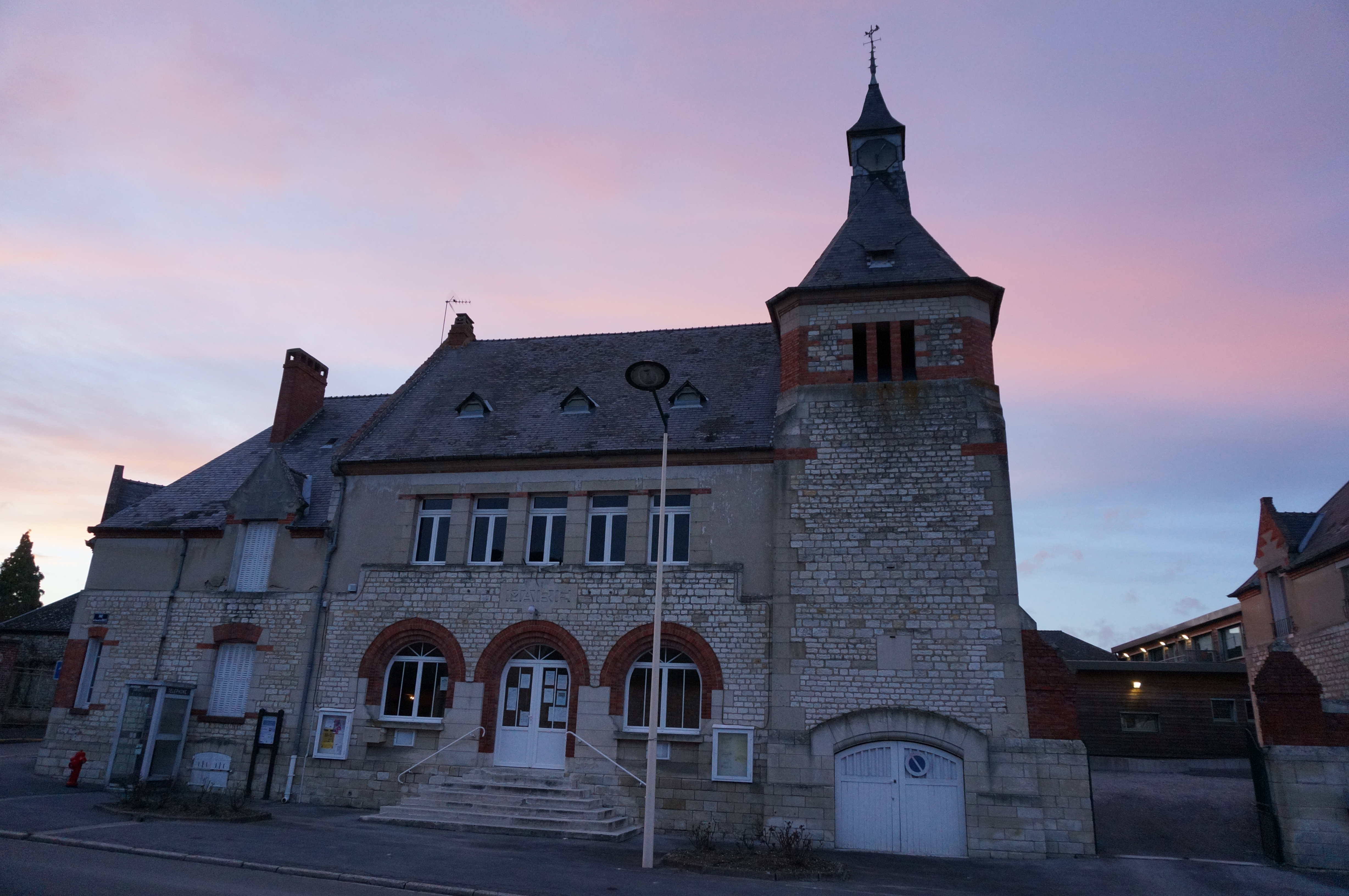 Vue du village de Pierrepont (Aisne).